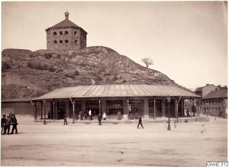 Skanstorget, Aron Jonason, 1901. GhmE-312